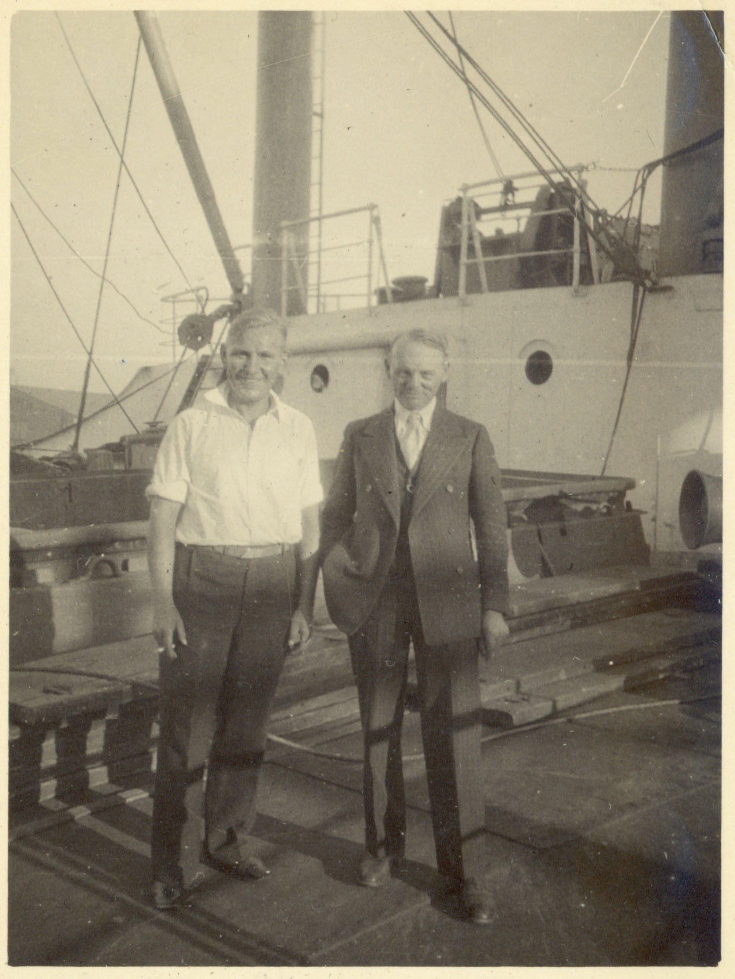 Überfahrt Louis Löschners von Amerika nach Deutschland